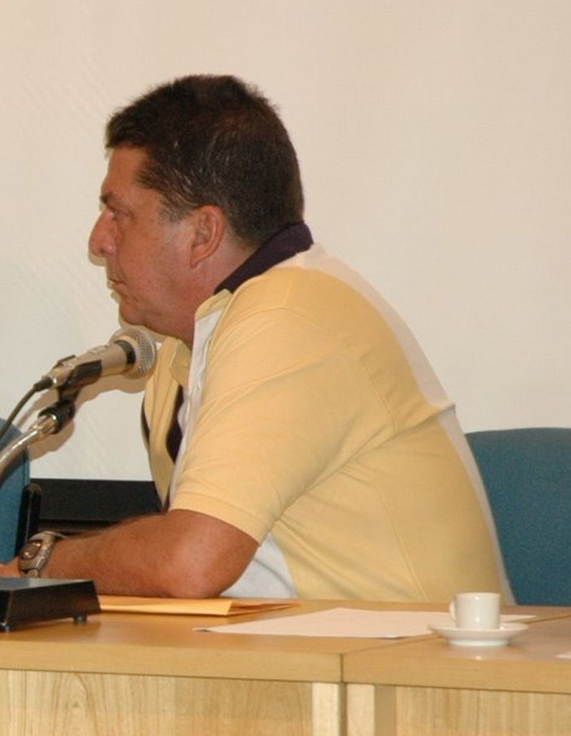 (portuguese) Stepan Nercessian, ator e político brasileiro, no ato de lançamento da União Geral de Trabalhadores